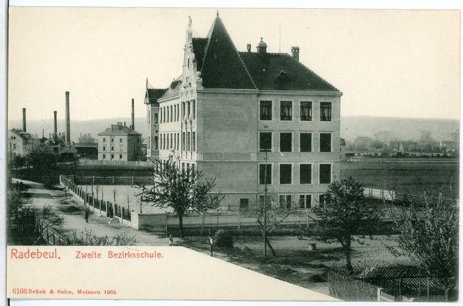 Radebeul; 2. Bezirksschule This postcard is from publisher Brück & Sohn in Meißen ( postcard has a unique number 06166 and is available in a higher resolution at the publisher. This images was uploaded in a cooperation project between Wikipedians and the publisher.